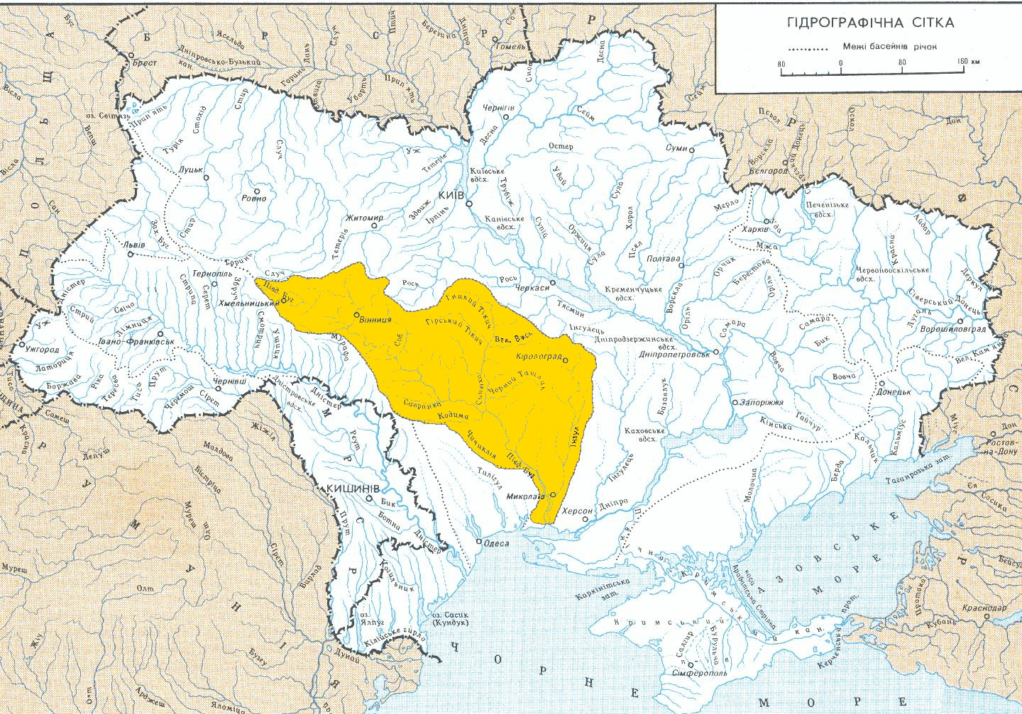 Бассейн реки Южный Буг.